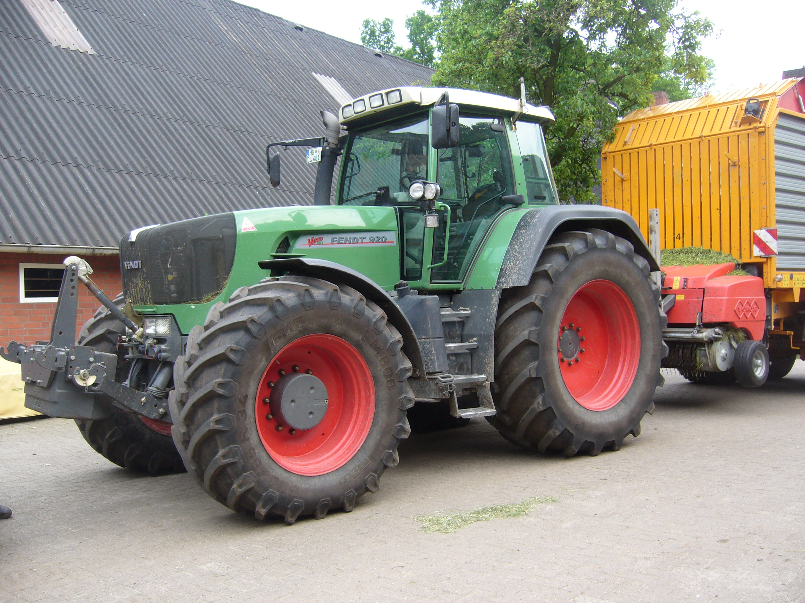 Fendt-Schlepper 920 Vario TMS mit Veenhuis-Ladewagen